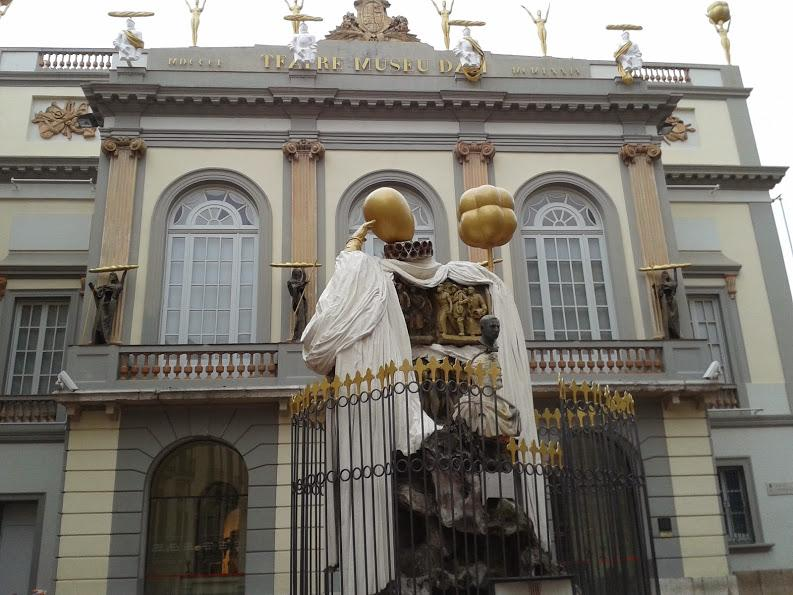 Museu Dalí (Figueres)